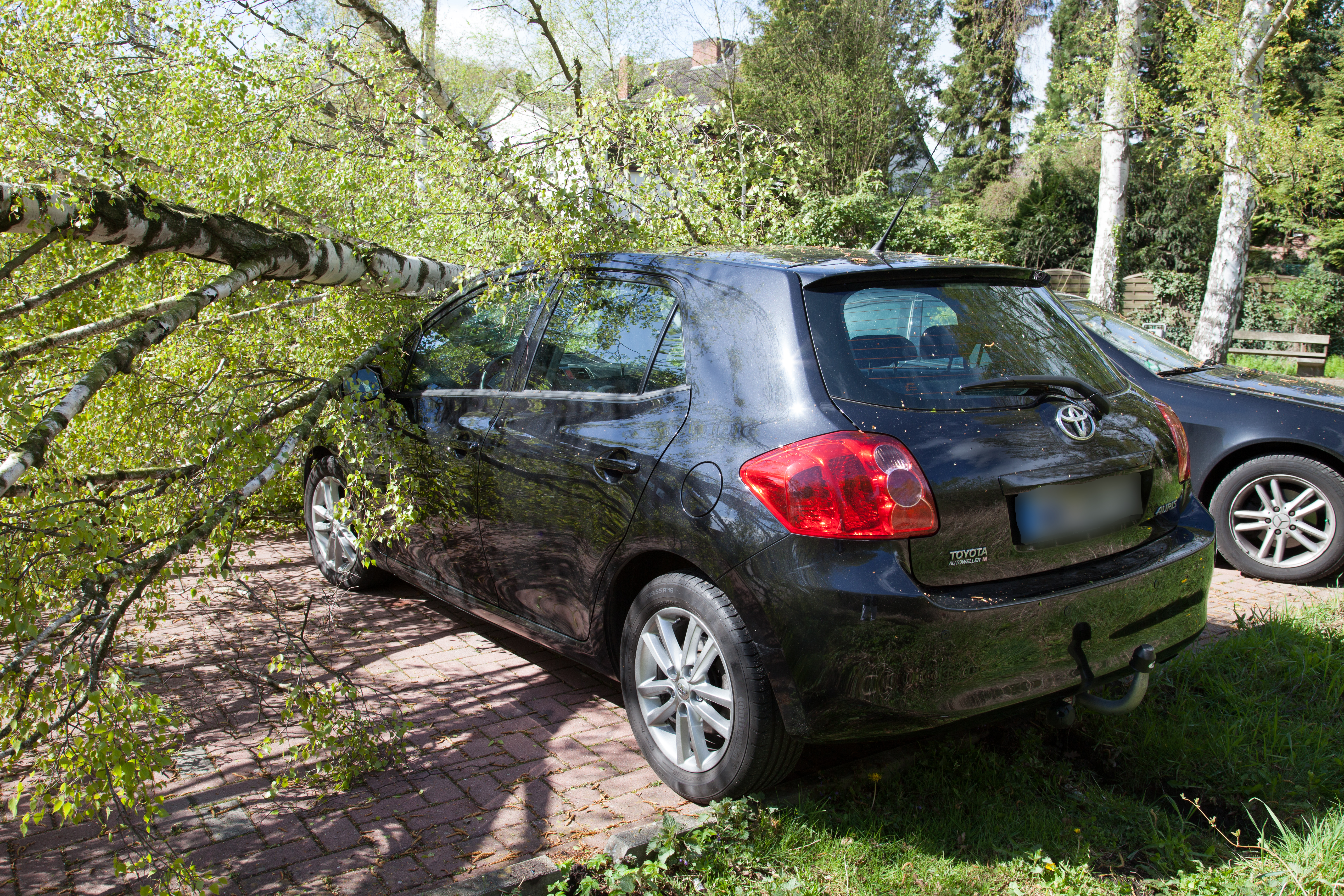 Die Freiwillige Feuerwehr Stadt Syke beseitigt eine umgefallenen Birke nach einem Sturm.